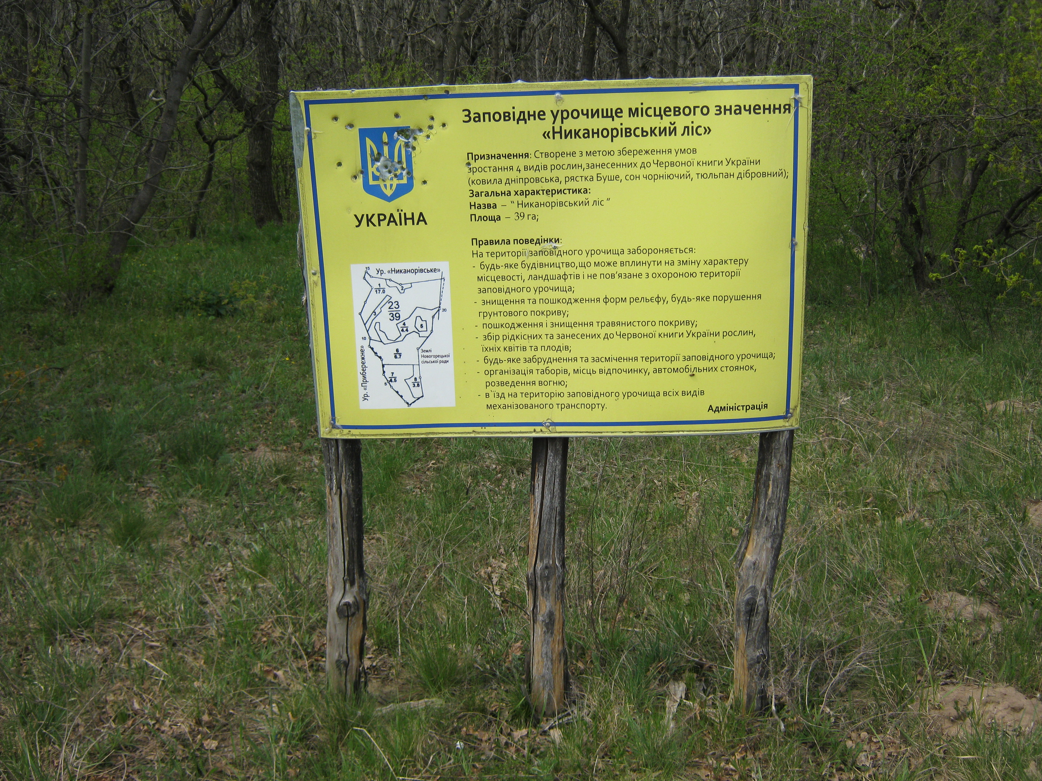 Информационная надпись. Начало старого леса (по поводу дырок: не обращайте внимания, дурачки везде есть).